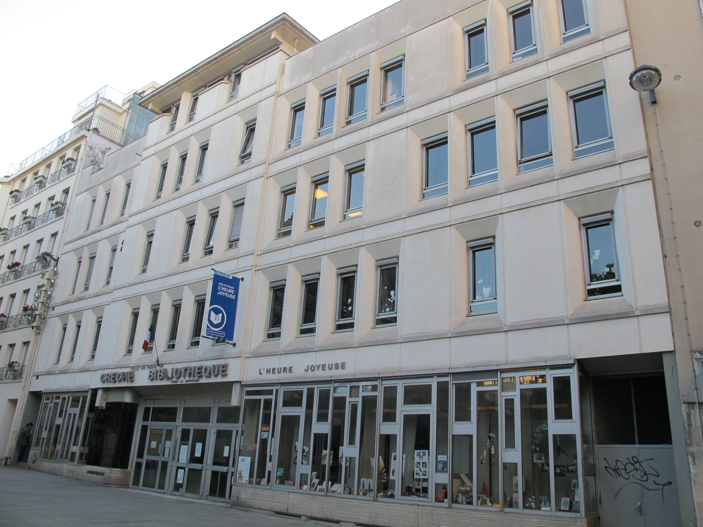 L'Heure Joyeuse - bibliothèque municipale parisienne